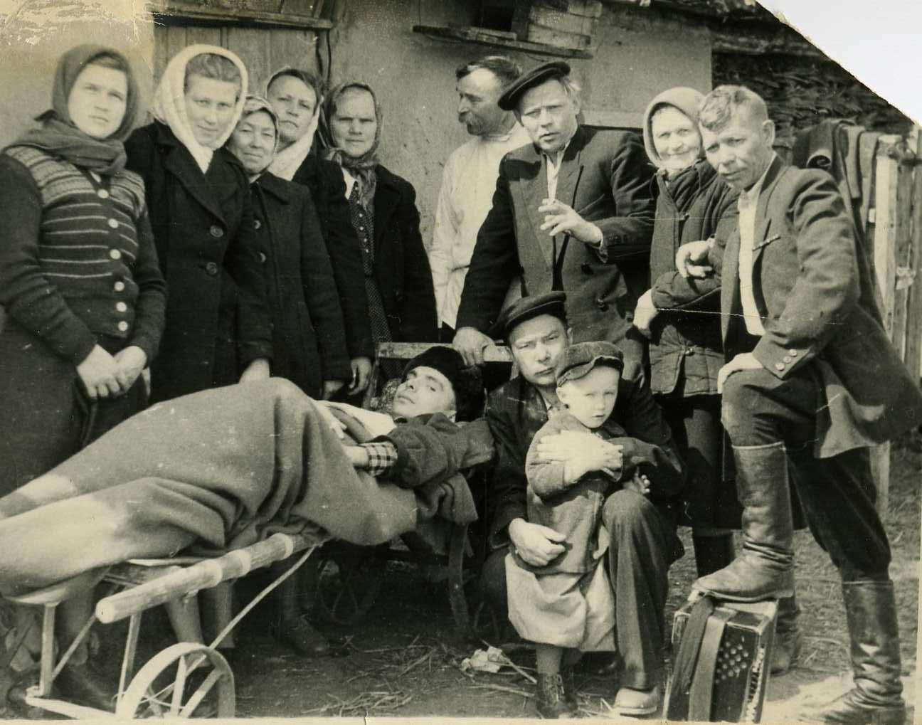 Детский поэт Леонид Иванович Куликов (парализованный с юности) с селе Половинном.